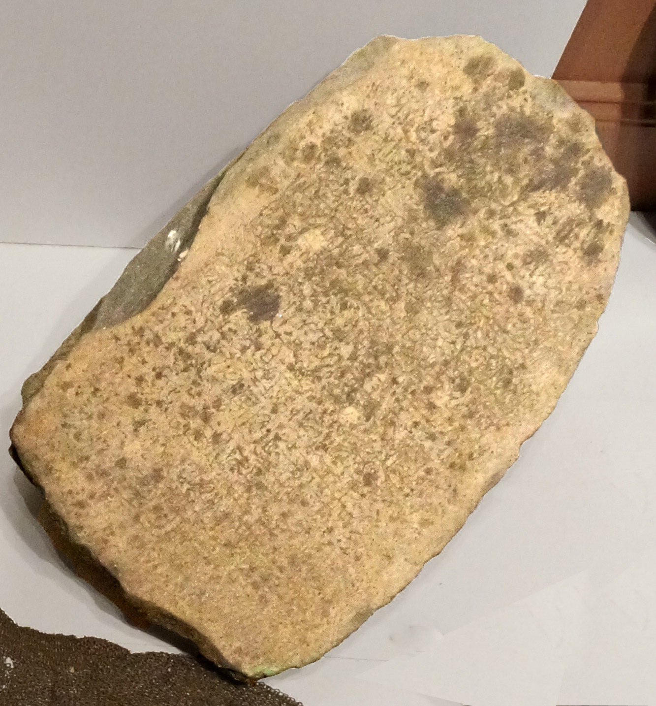 au Musée barrois, la Pierre tombale sultan Ahmed 1539 archipel Dahlak.